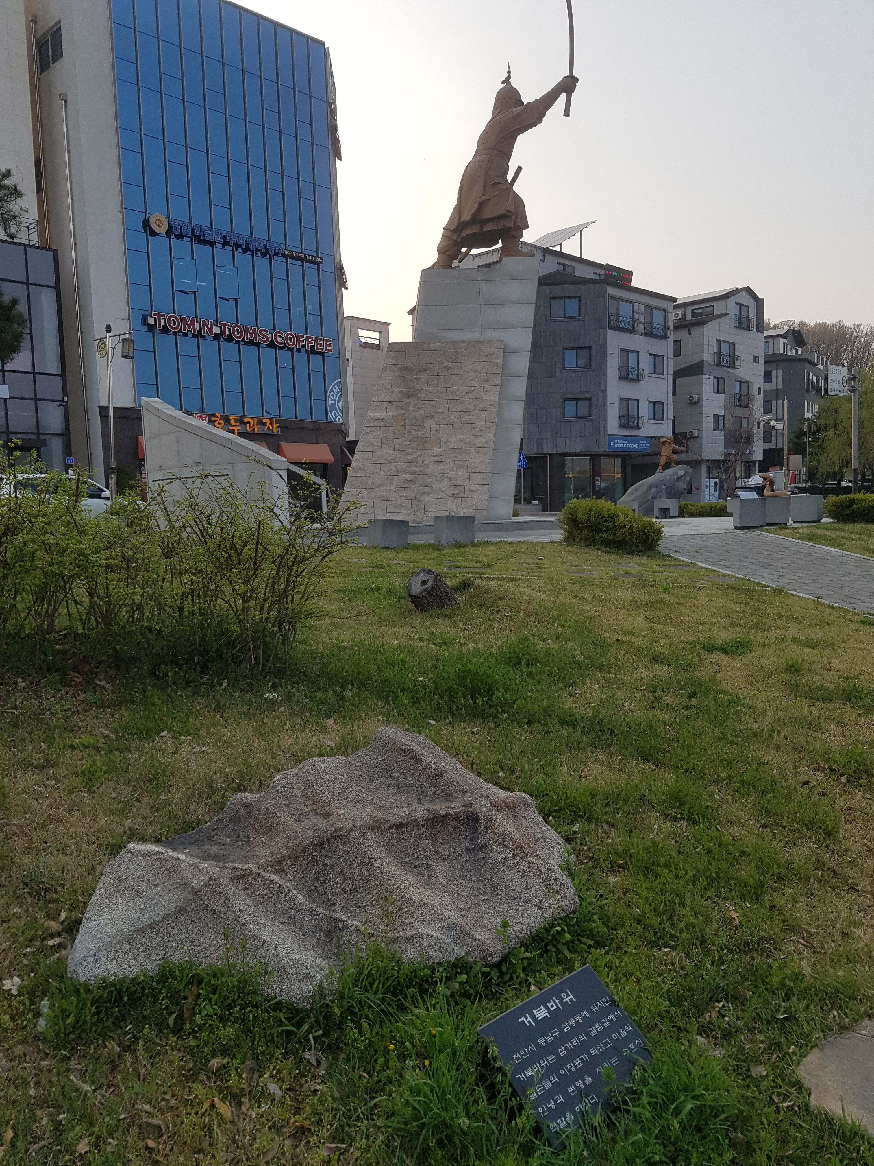 천안삼거리-김시민동상 거북바위